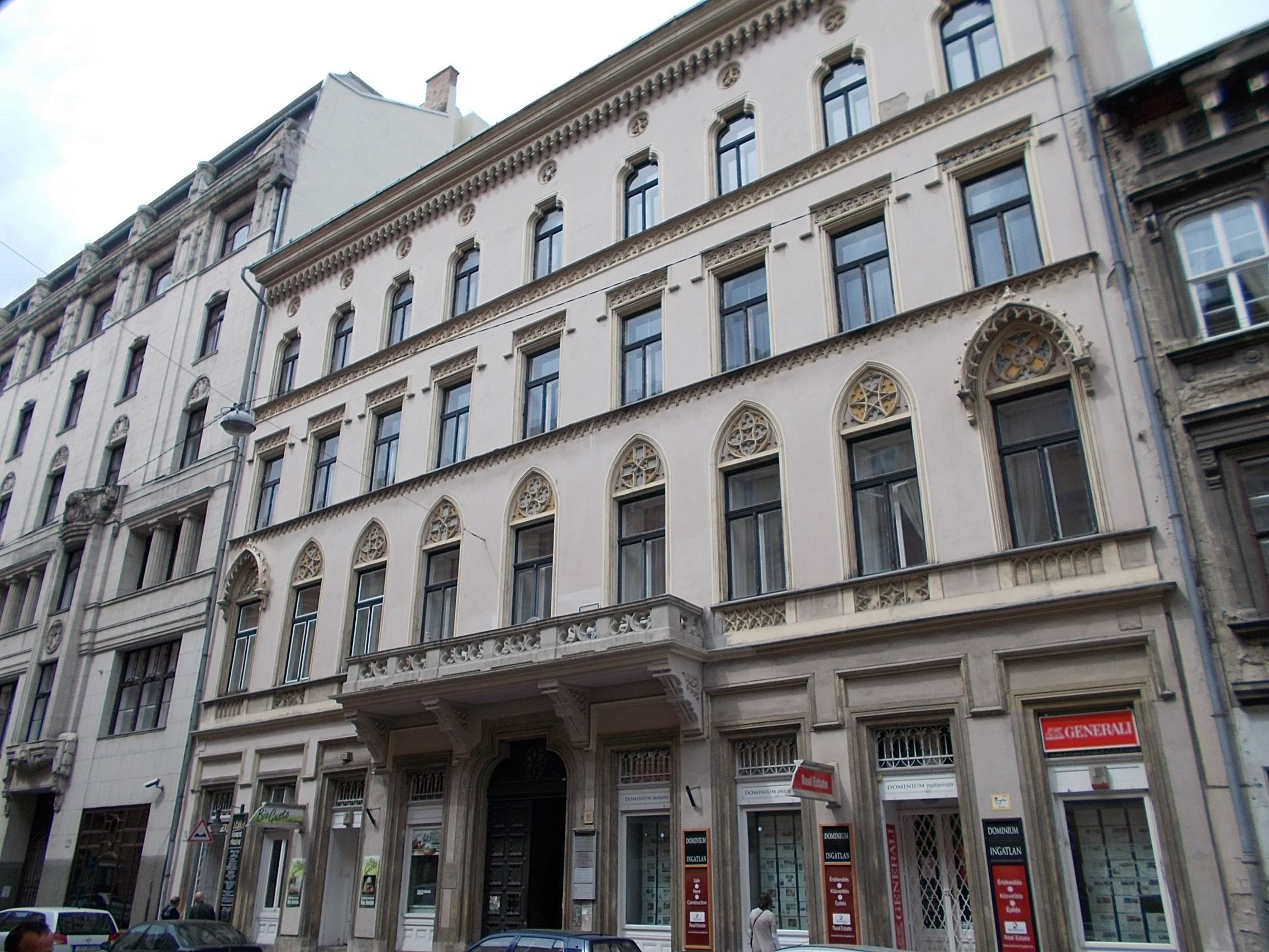 Volt Borsody-ház. Háromemeletes, gótizáló romantikus ház, Gerster Károly, 1845-1846.. Műemlék lakóház. ID 426 - Budapest, 5. kerület.Arany János utca 16